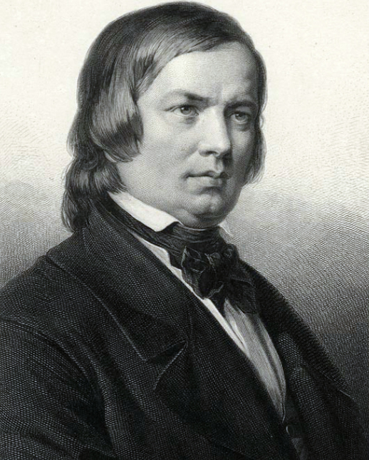 Una voz sobre la Tierra